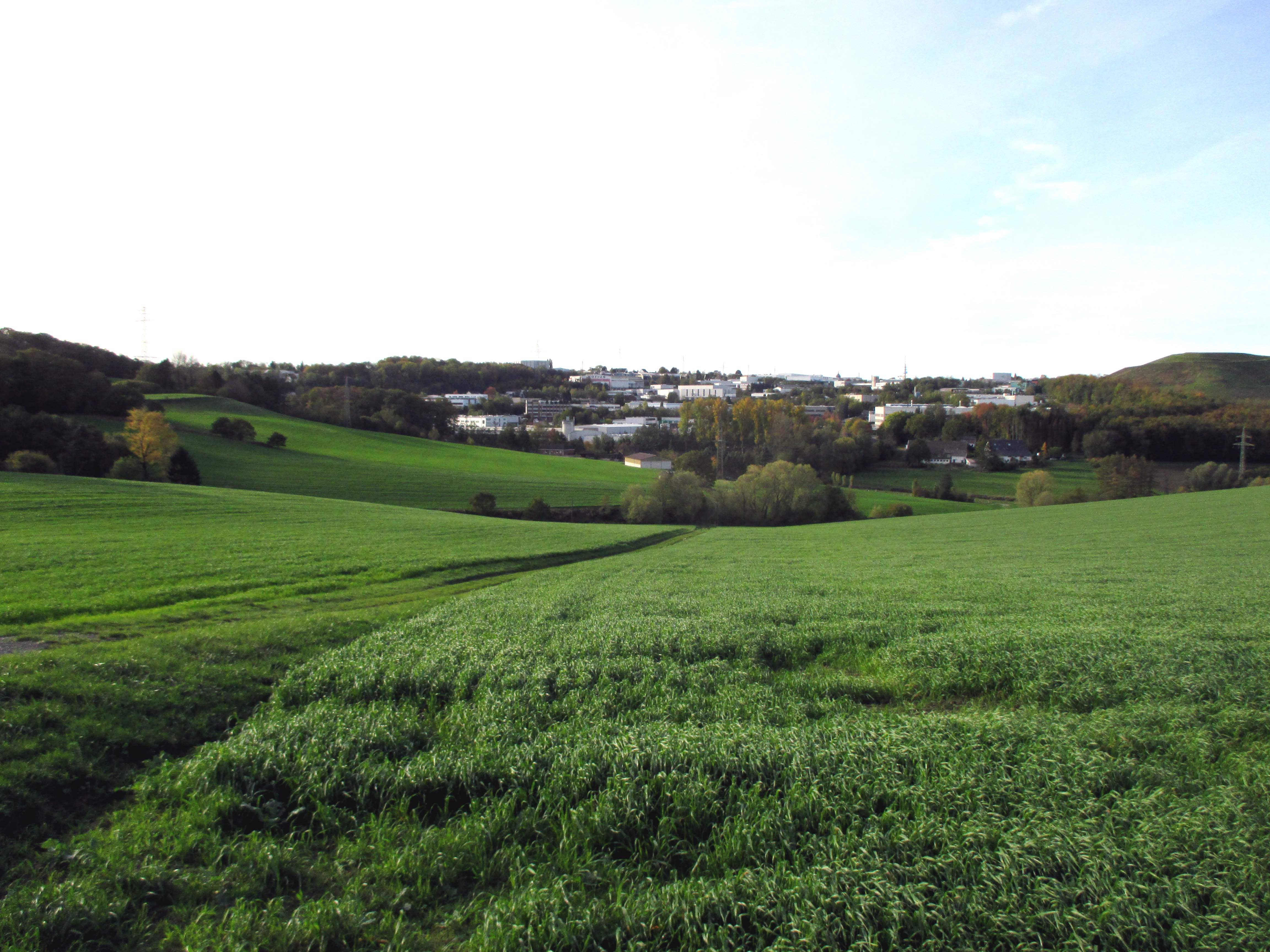 Röbbeck Velbert Rottberg Eintrachtstraße